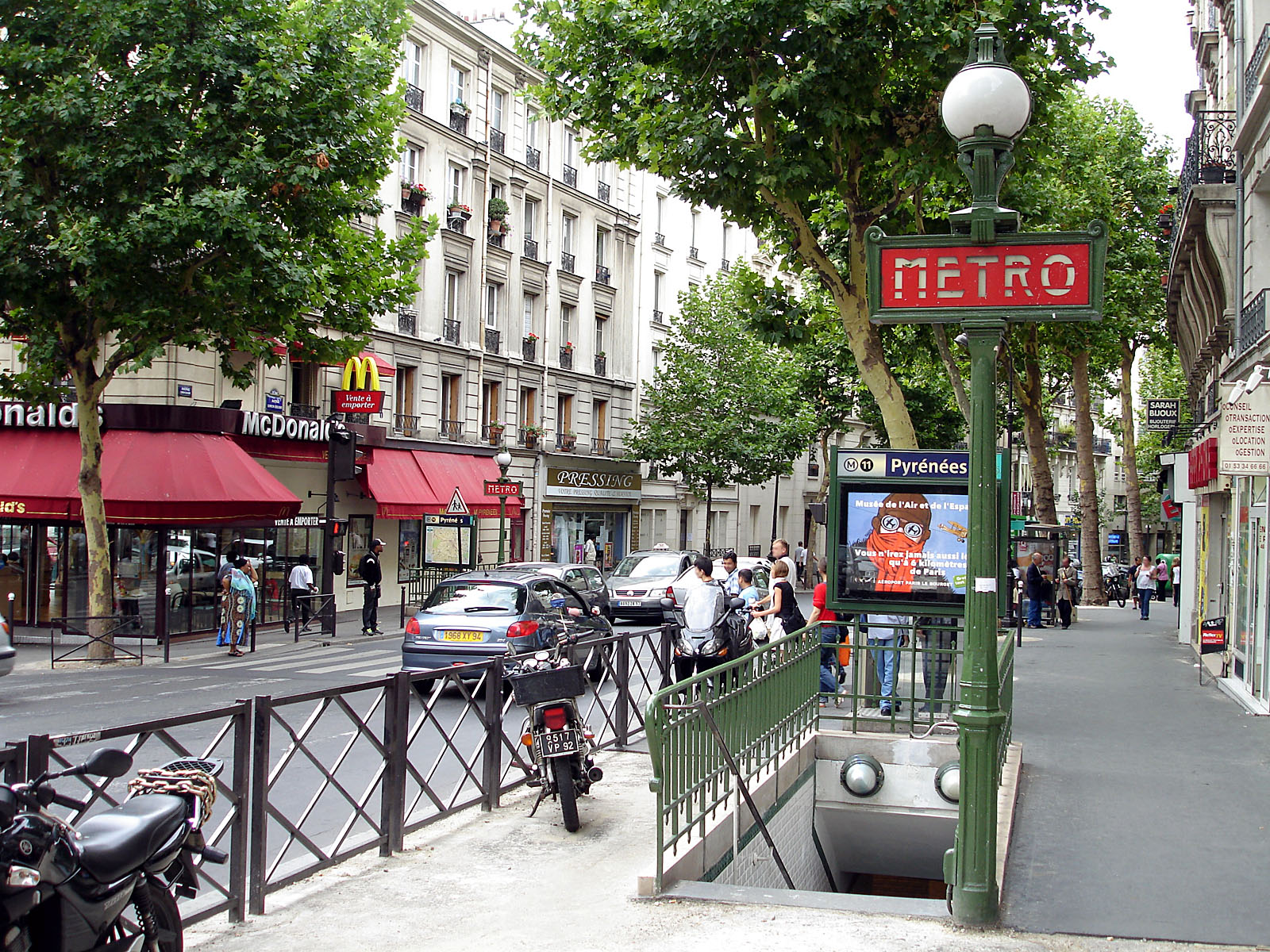 L'avenue Simon-Bolivar, dans le 19e arrondissement de Paris.